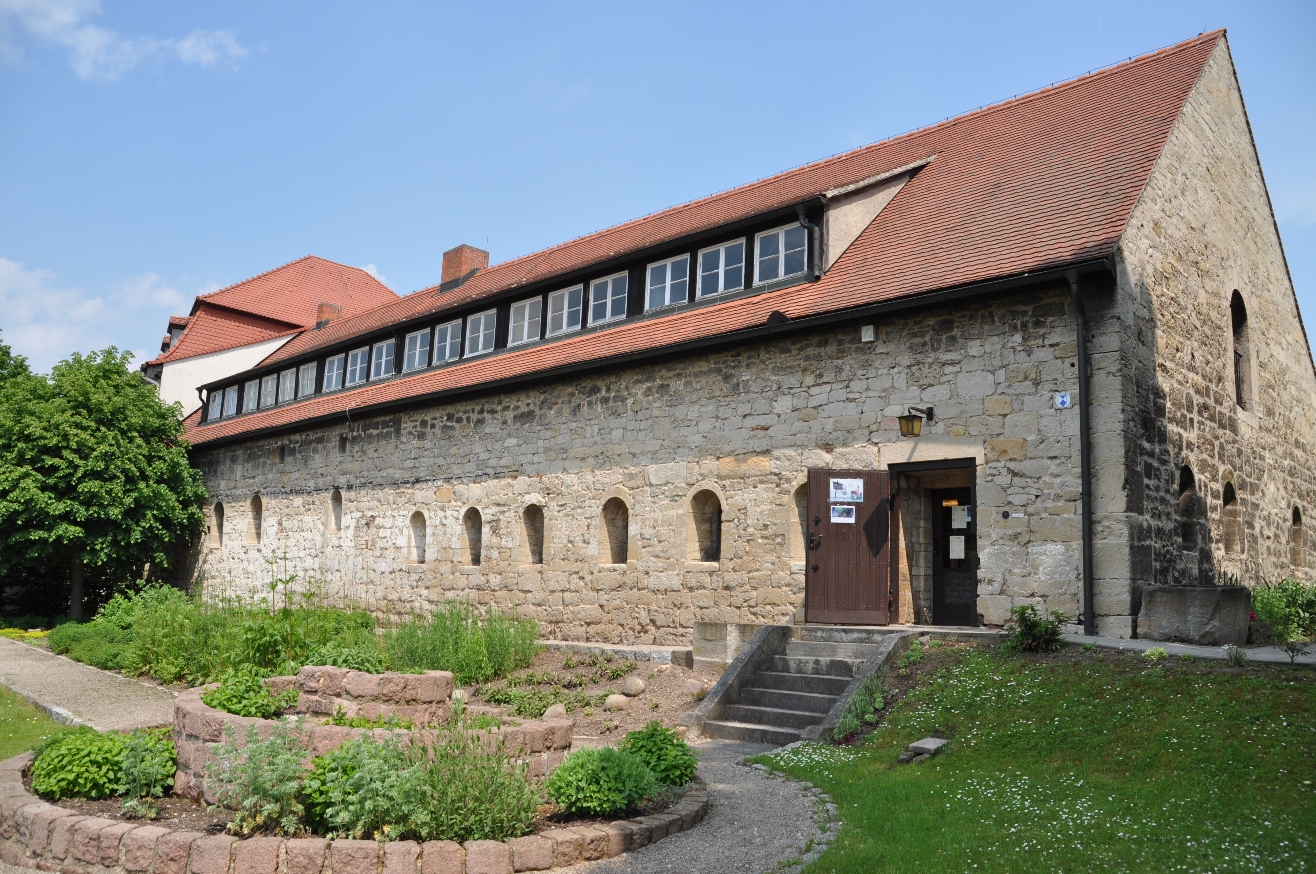 Romanisches Haus in Bad Kösen (Deutschland). Das Gebäude beherbergt ein ortsgeschichtliches Museum.